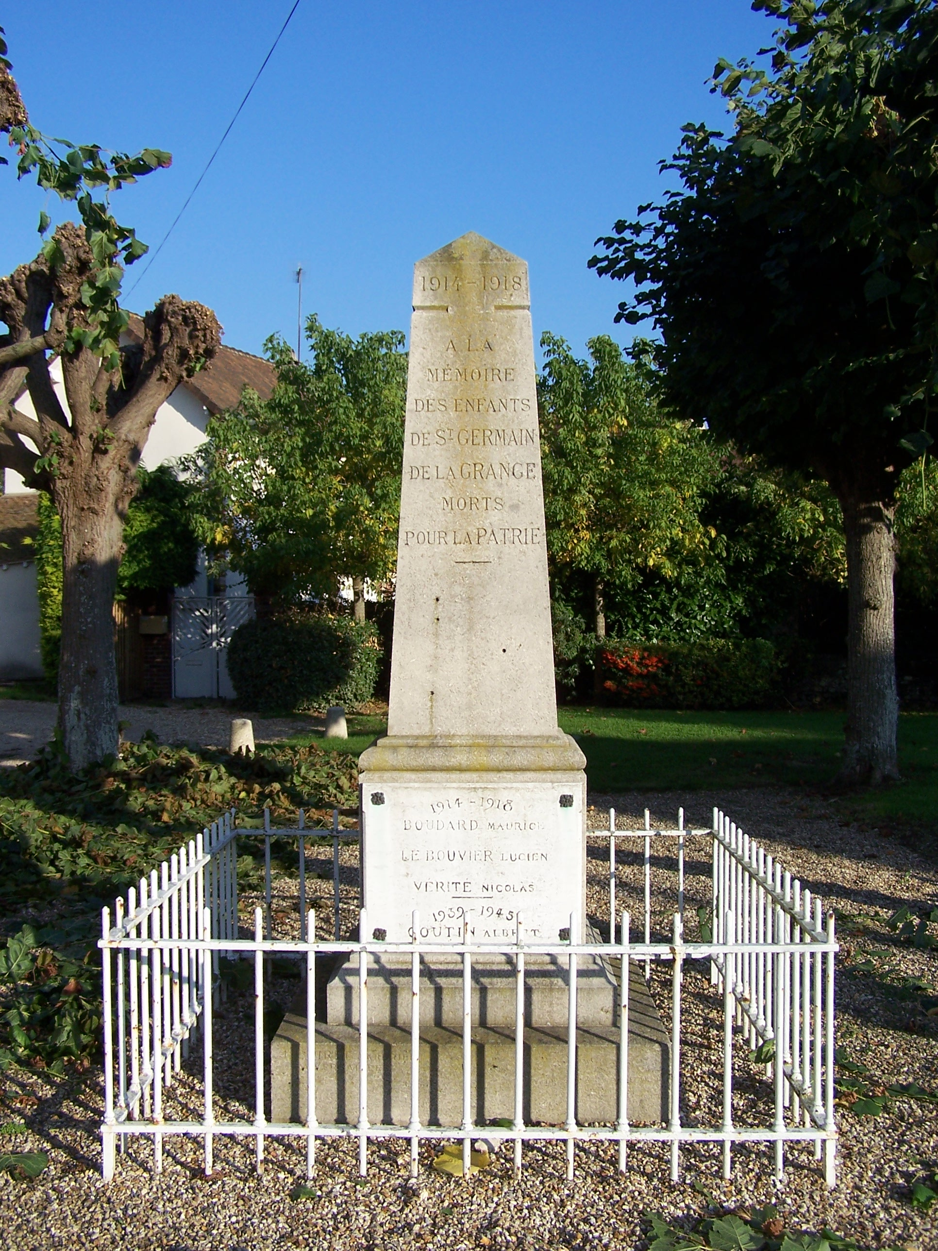 Monument aux morts de Saint-Germain-de-la-Grange (Yvelines, France)